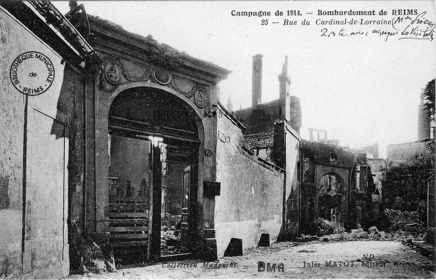 à Reims.